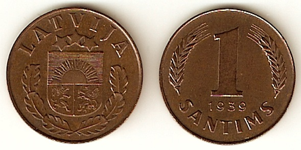 1 santims 1939, Latvia/Moneta łotewska 1 santim, 1939